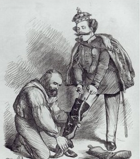 Caricature de Garibaldi et Victor Emmanuel II, journal anglais Punch, Londres, 1860